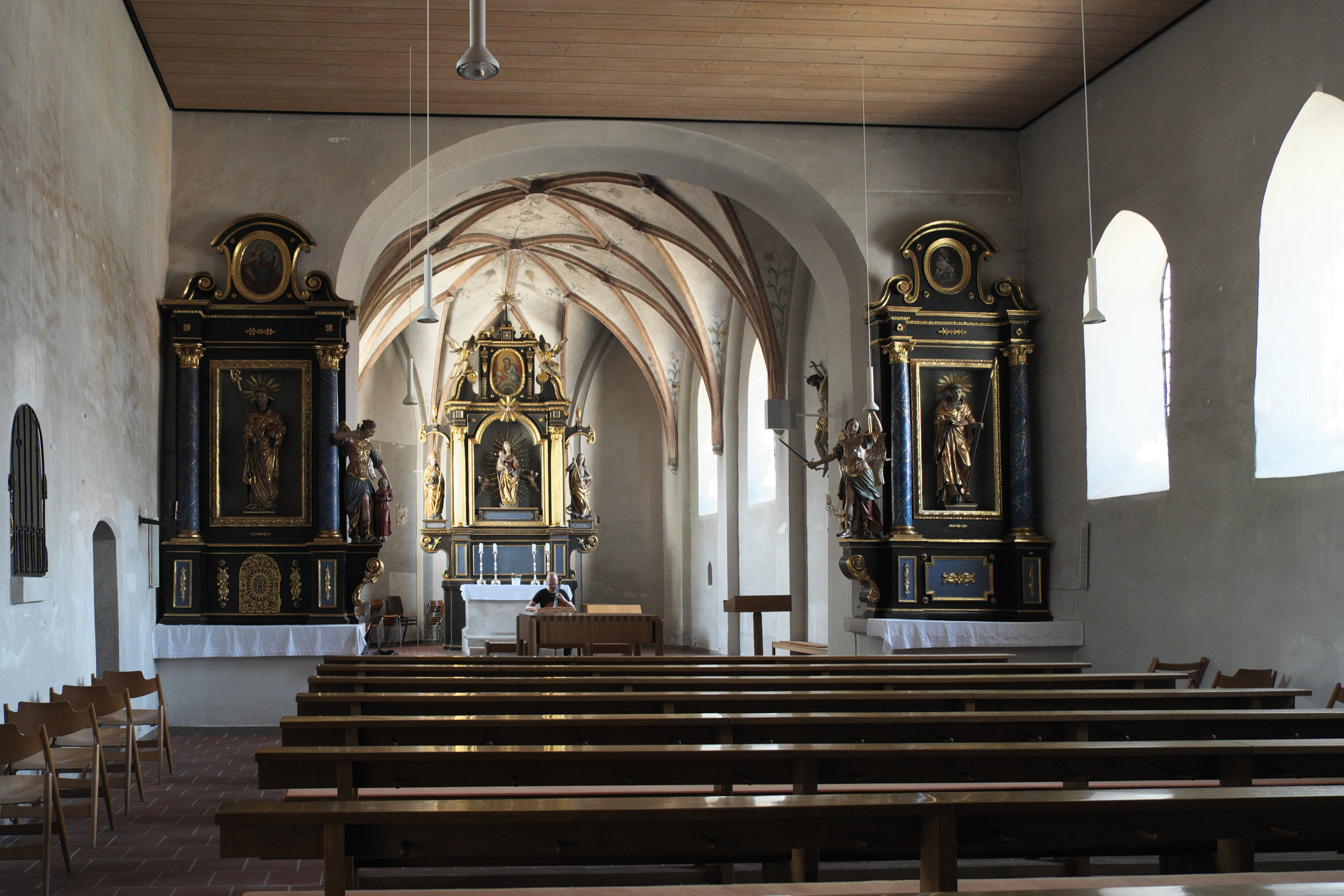 Alte katholische Pfarrkirche St. Nikolaus in Neuried (bei München) im Landkreis München (Bayern, Deutschland), Innenraum